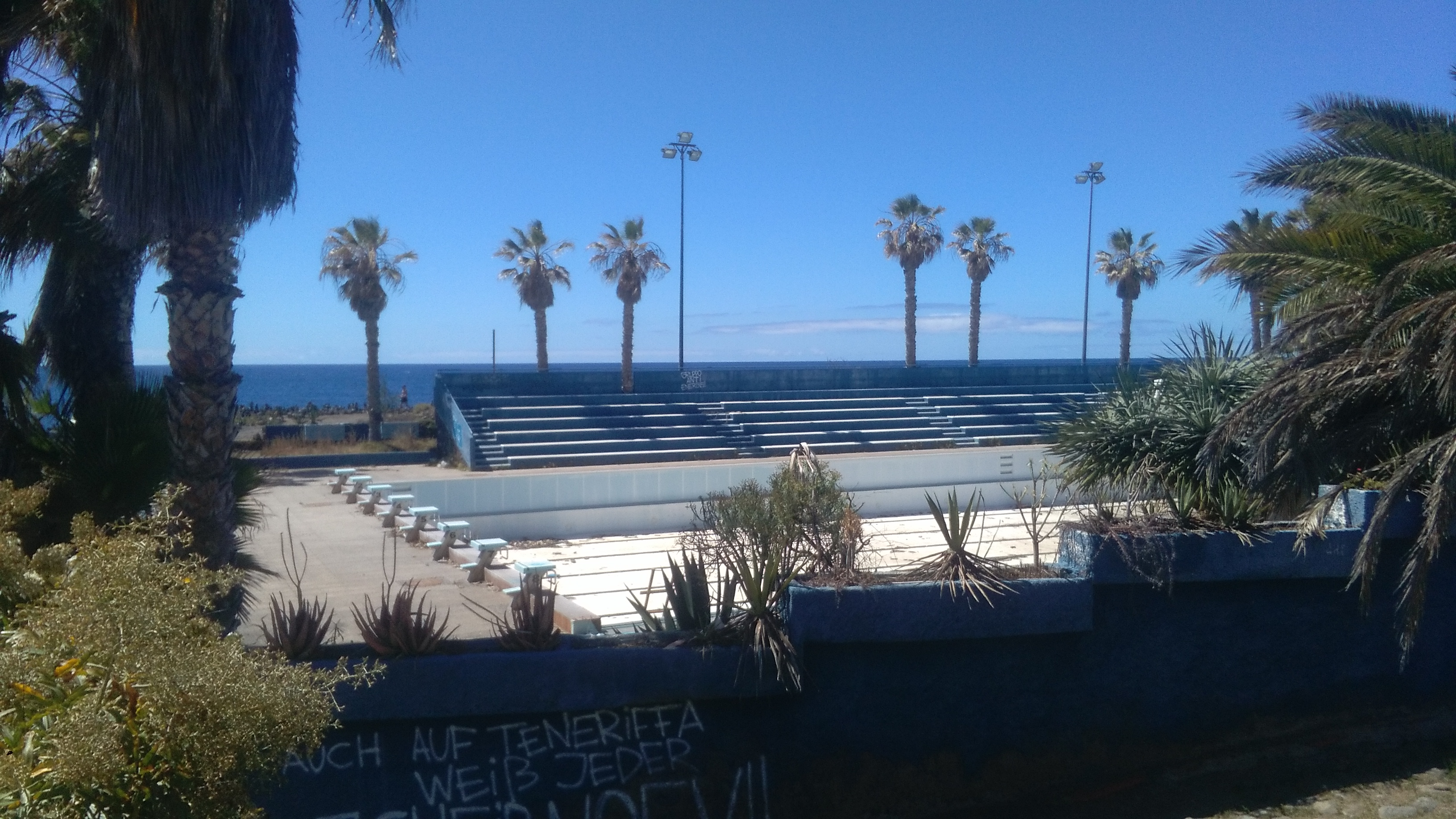 Fotografía en la que se muestra el abandono de la instalación. Sede del CN Martiánez y CN Oceáno.